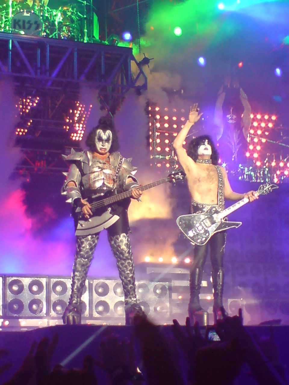 Det här är en bild av Gene Simmons och Paul Stanley från bandet KISS. Bilden tog jag själv under deras spelning i Stockholm.